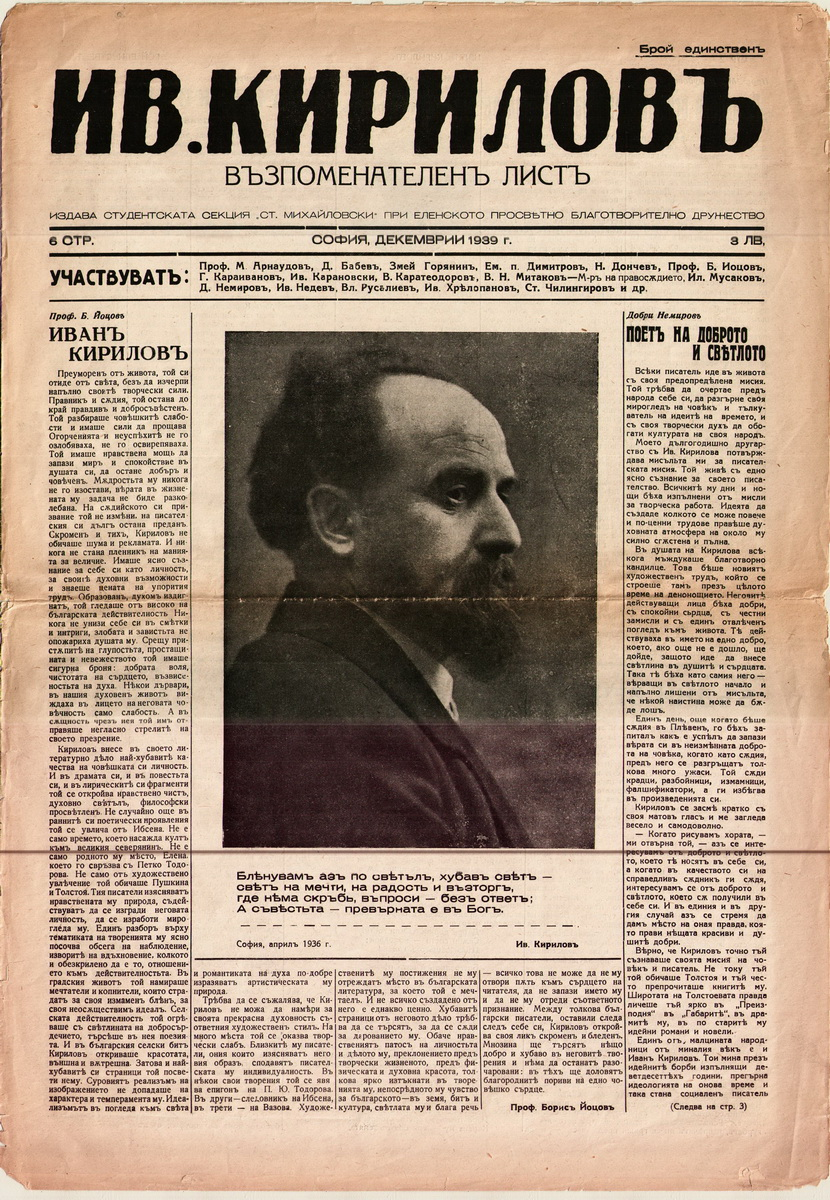 Възпоменателен лист за Иван Кирилов